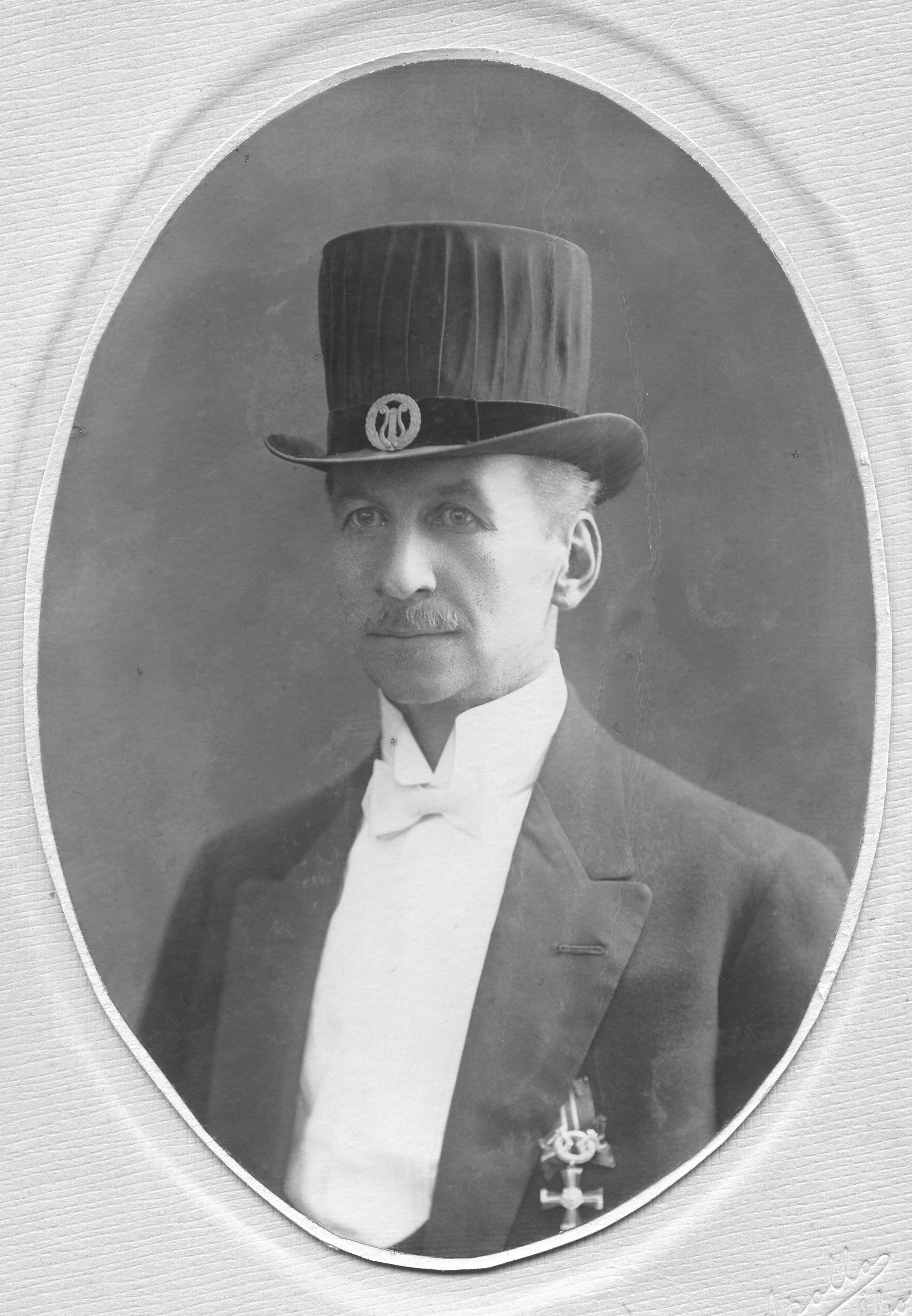 Thorsten Renvall